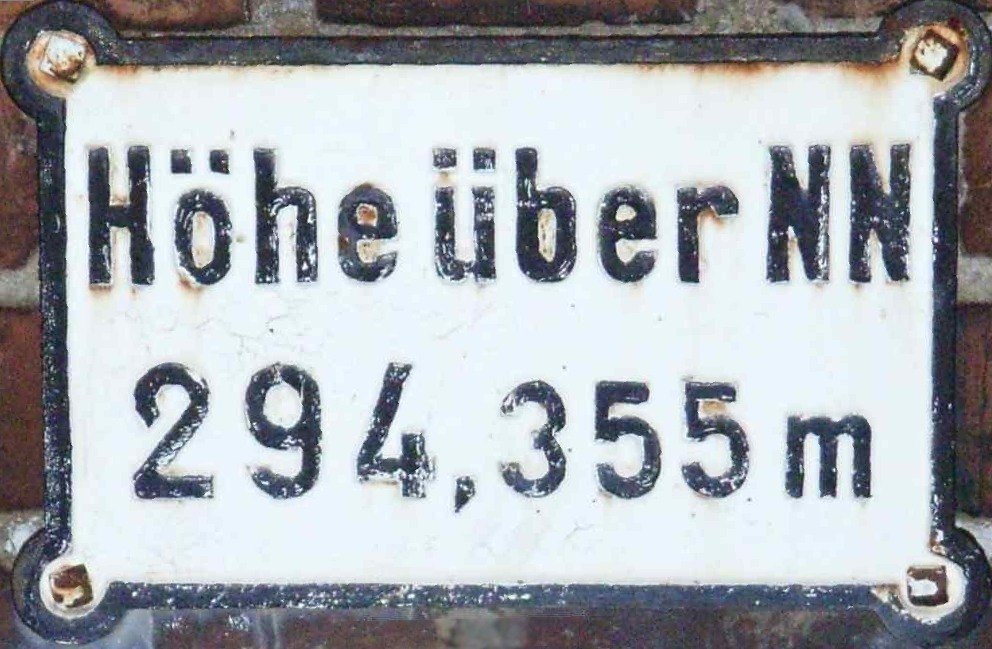 Angabe der Höhe über Normalnull von 294,355 m in Altenhasungen, gesehen 2007.